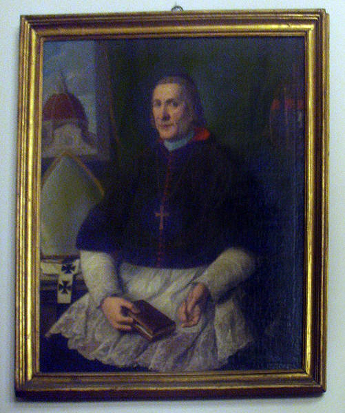 Ritratto dell'arcivescovo Antonio Martini (1720-1809)